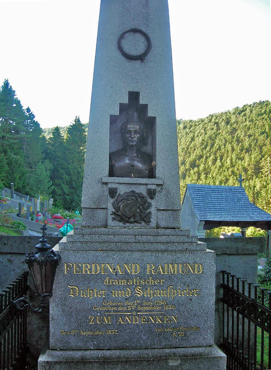 Ferdinand Raimunds Grab in Gutenstein (NÖ)